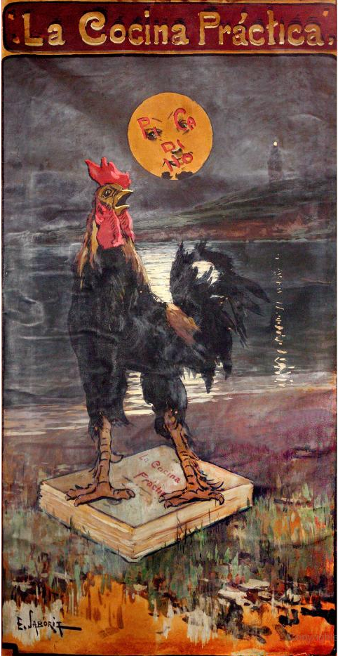 Cartel feito polo pintor Enrique Saborit para facer propaganda de "La cocina práctica" de Picadillo.